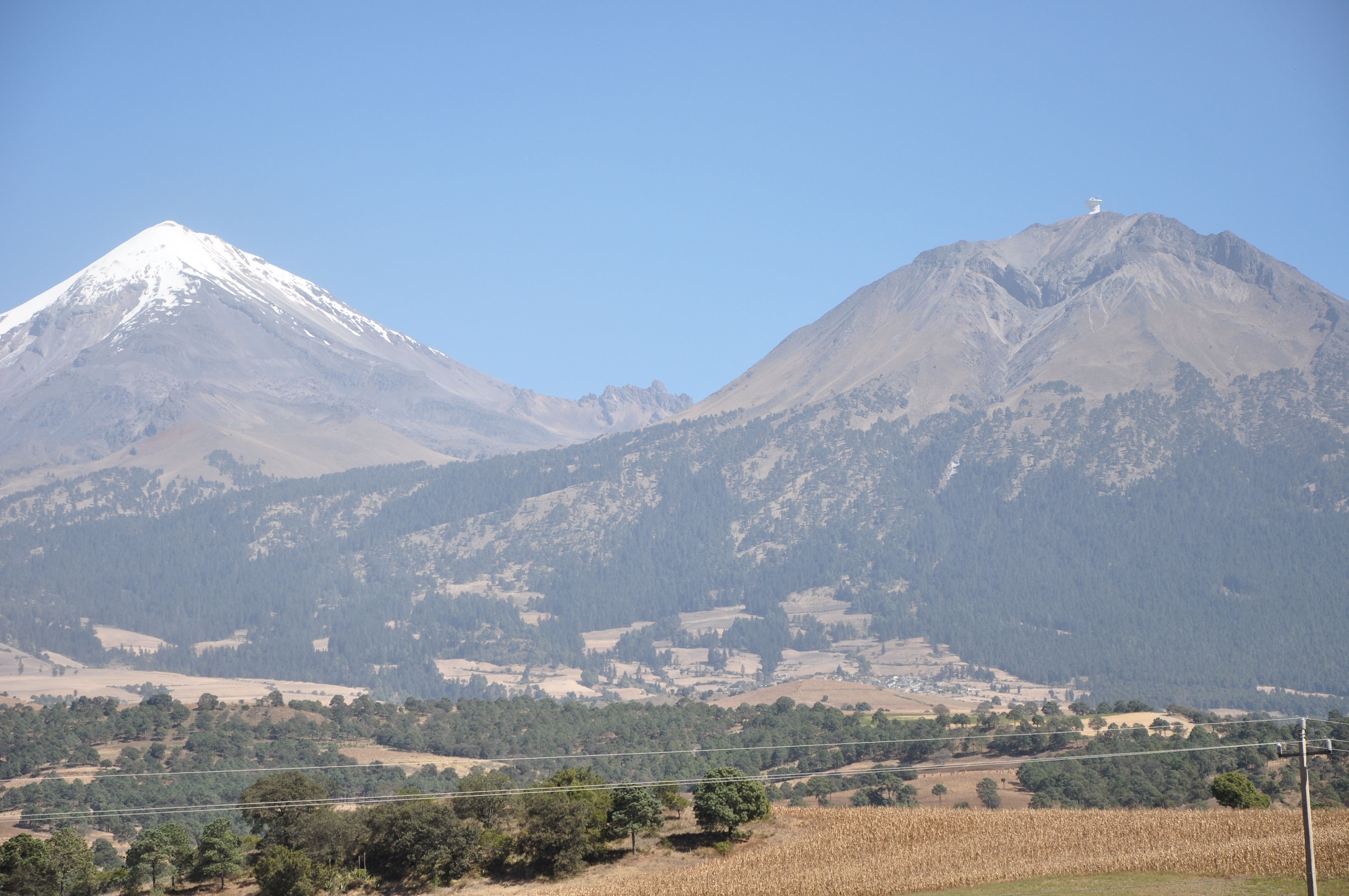 Volcanes Citlaltépetl y Sierra Negra